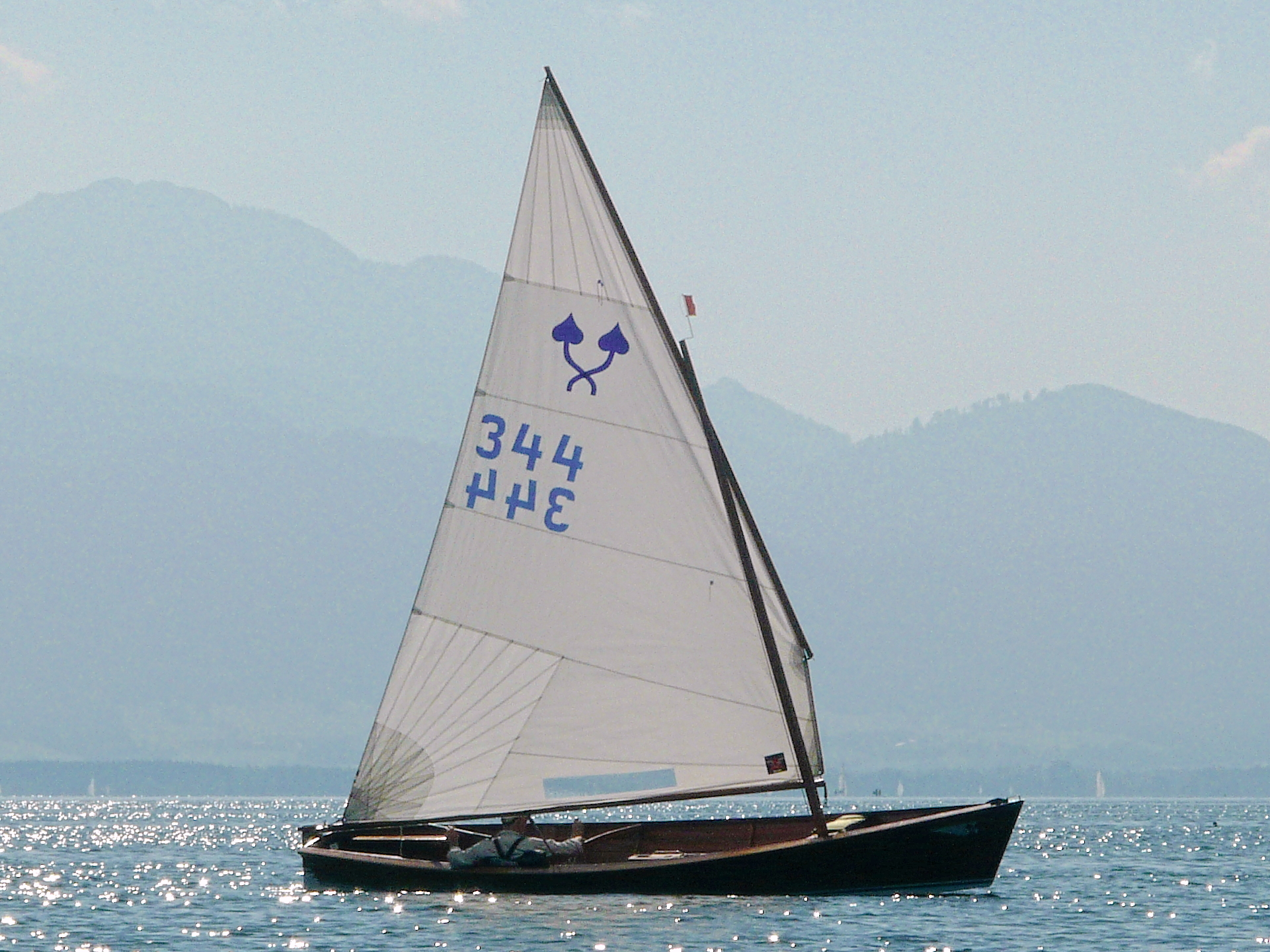 Chiemseeplätte 344 auf dem Chiemsee vor Seebruck